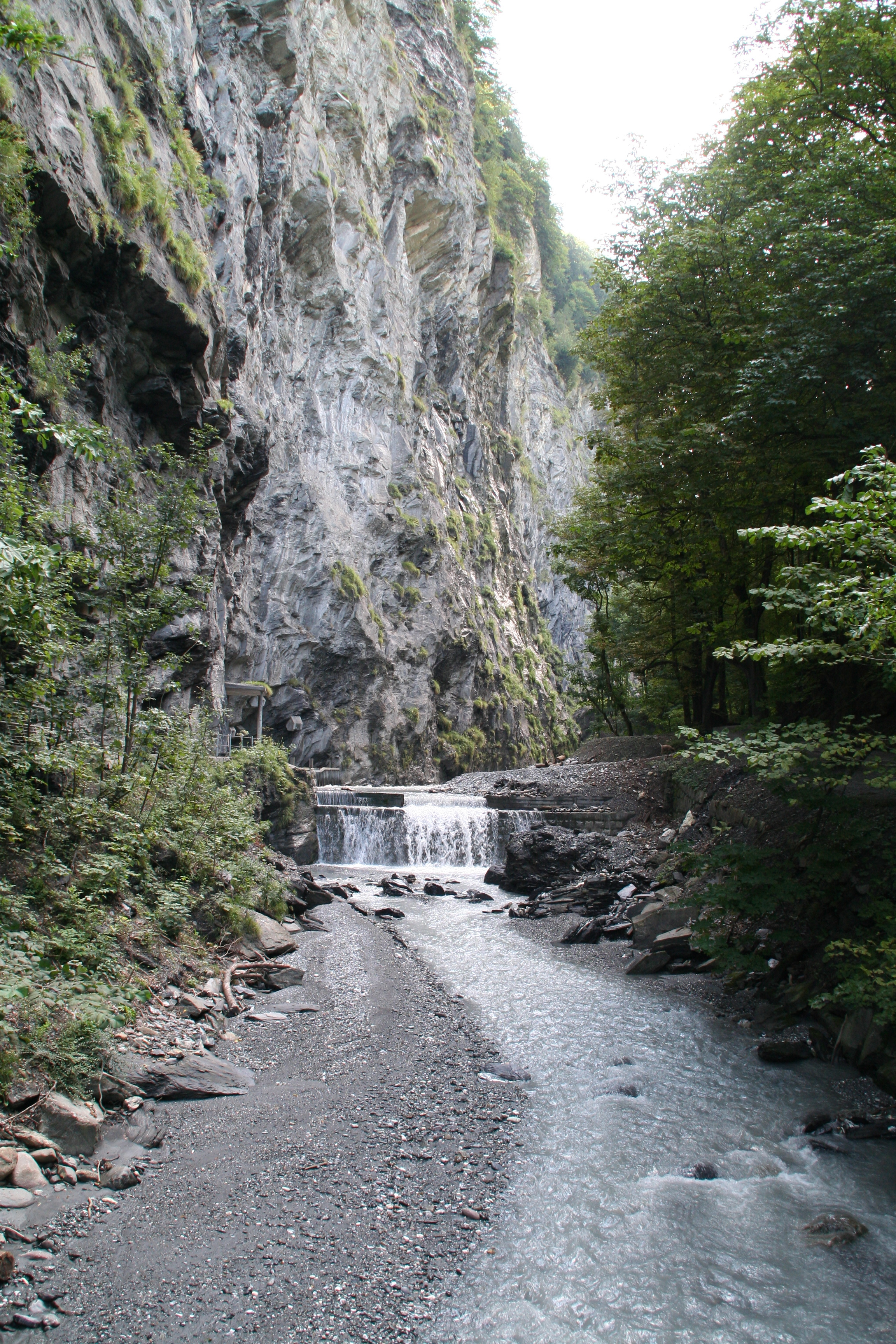 Taminaschlucht